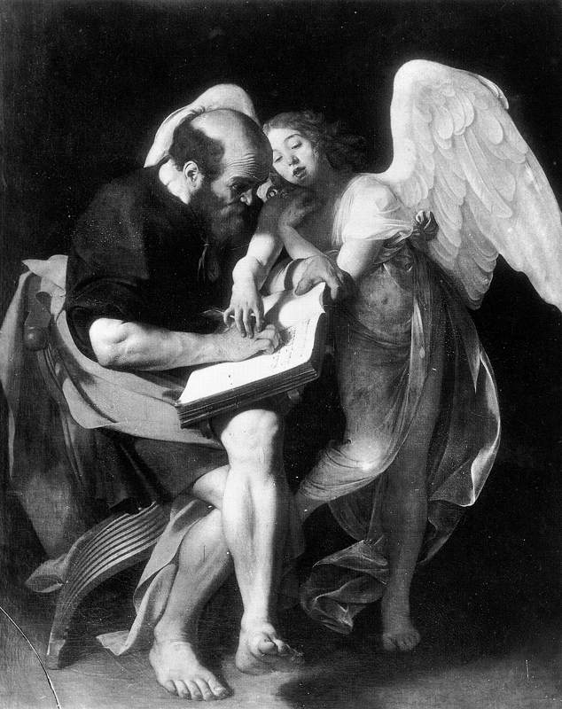 Saint Mathieu et l'ange